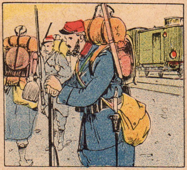 Extrait de : Pierre Hellin, Le régiment de papa, Le parfait notaire, 32e régiment d'infanterie, n° 100, Albin Michel, Paris, 1919 (bande dessinée : l'épopée du notaire Panonceau affecté au 32° RI pour la durée de la guerre). Illustration de l'embarquement dans les trains en direction du front vers la zone de concentration en Lorraine en Août 1914. (Document personnel)